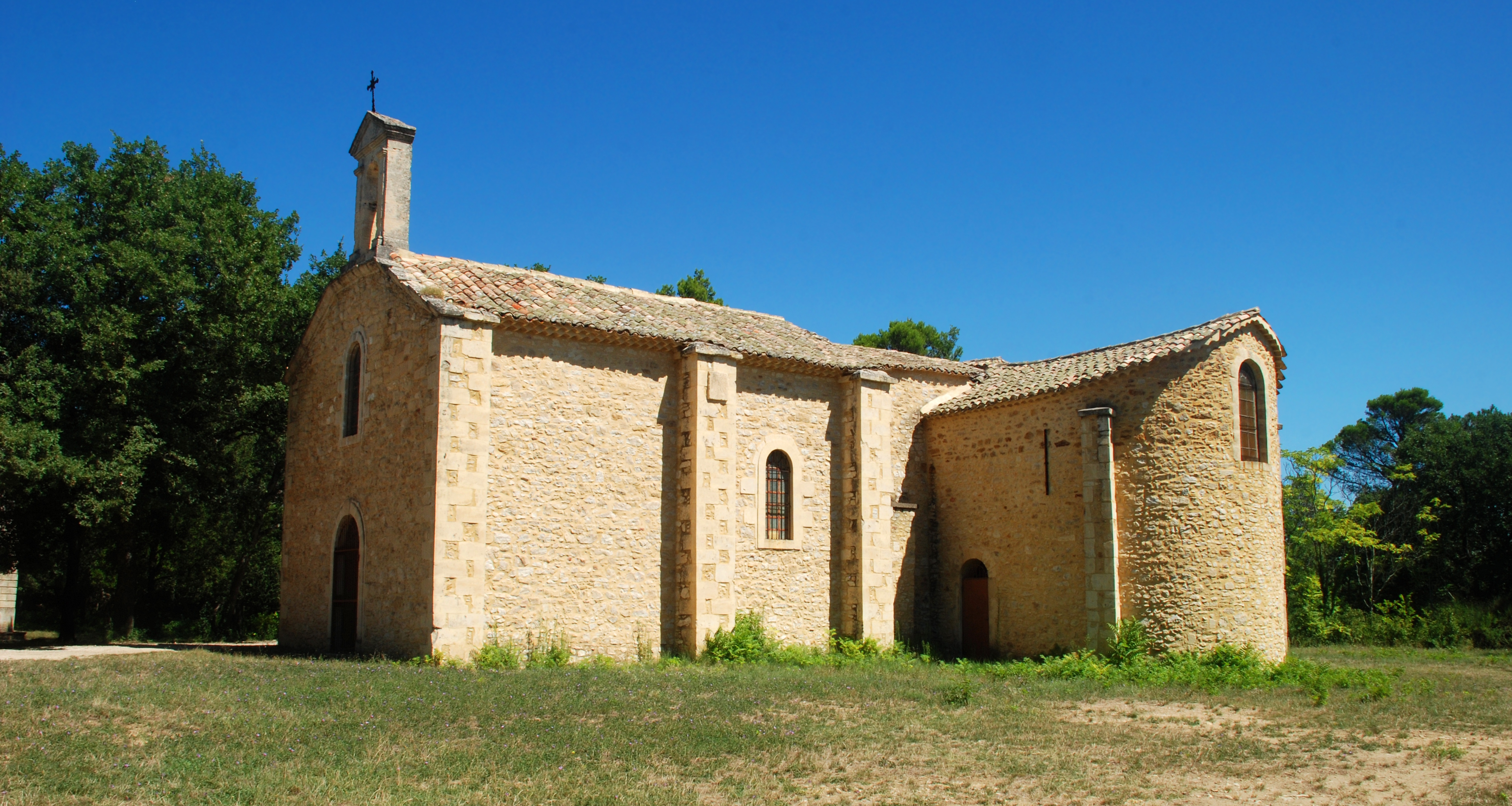 France - Gard - Cavillargues - Ermitage Notre-Dame-du-Saint-Sépulcre .